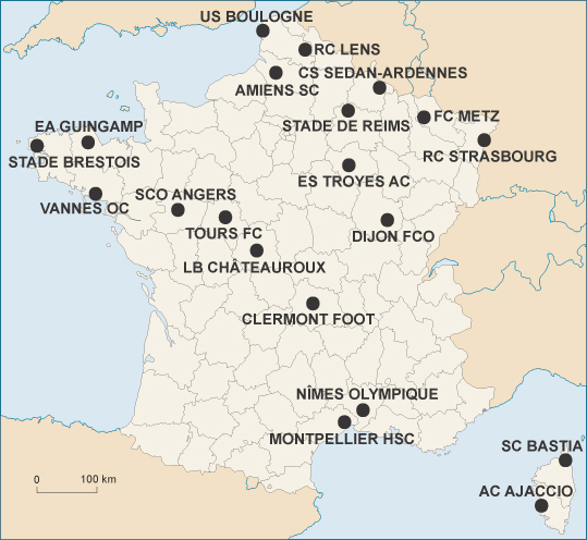 localisation des clubs de football participant au championnat de France de Ligue 2 2009-2010/localisation of soccer clubs taking part in the french championship Ligue 2 2009-2010